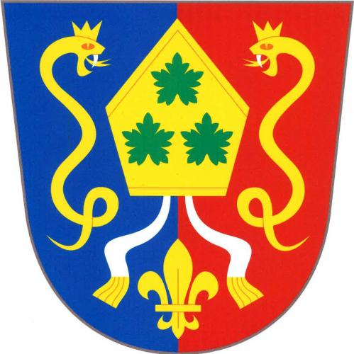 znak, Jarpice, okres Kladno